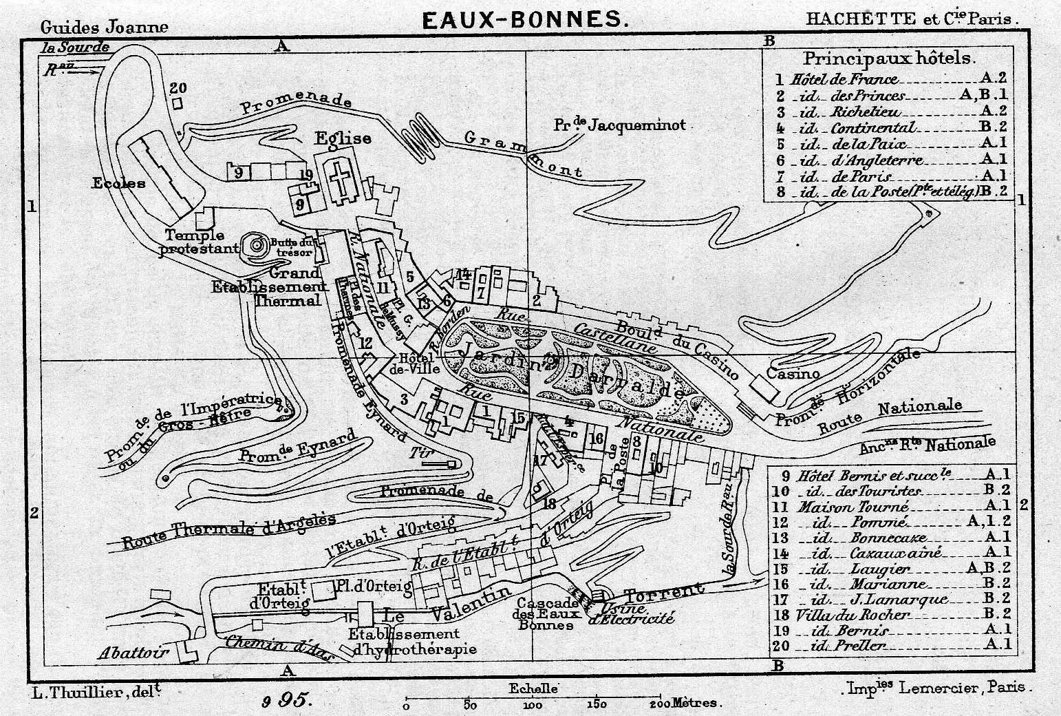 Carte des Eaux-Bonnes, Guide Joanne 1894